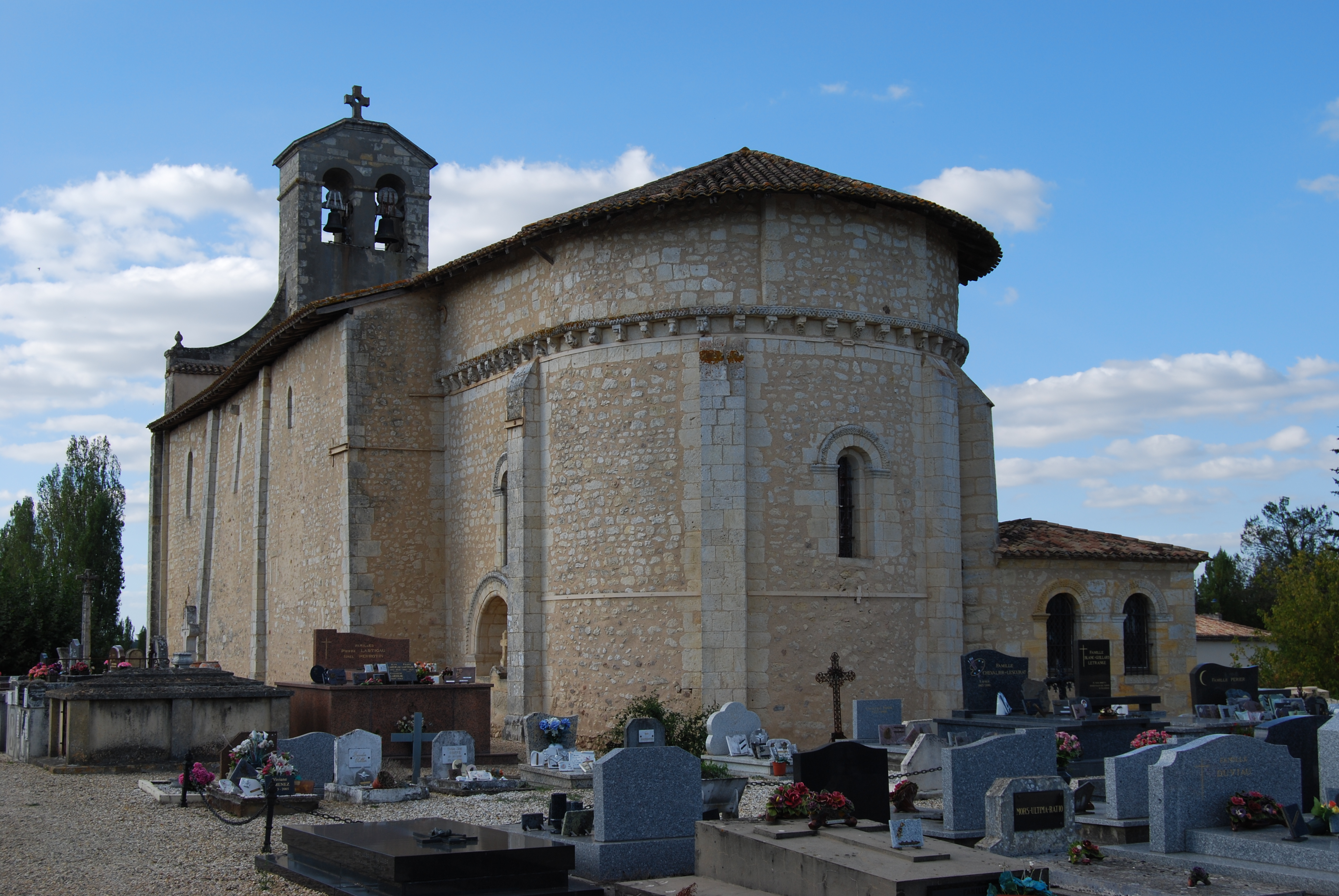 Église de Saint-Caprais-de-Bordeaux, (Inscrit, 1925) .